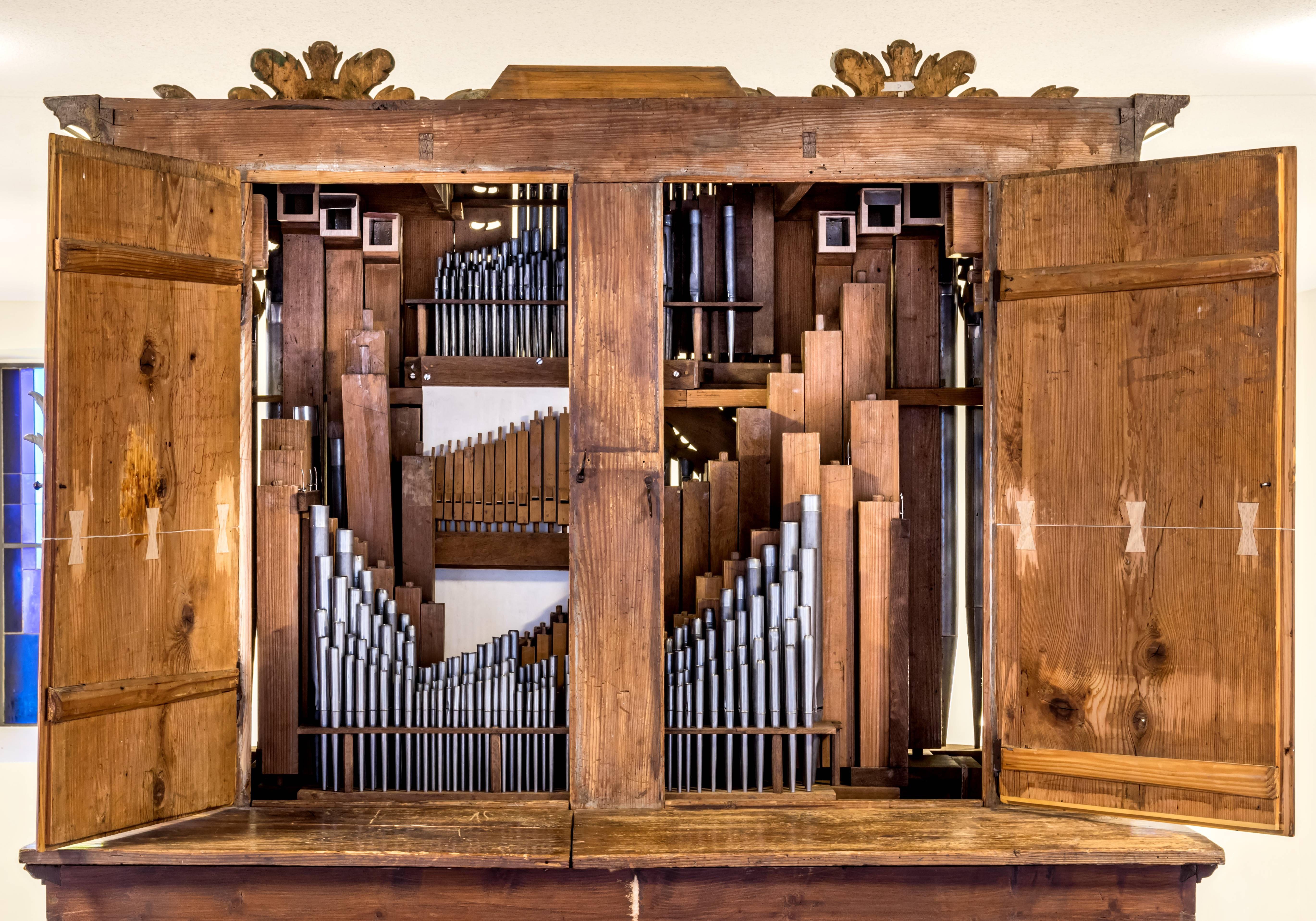 Bilder aus der evangelischen Kirche in Hertingen Die Orgel aus dem Jahre 1787 von Blasius Bernauer Detailaufnahmen Die Register